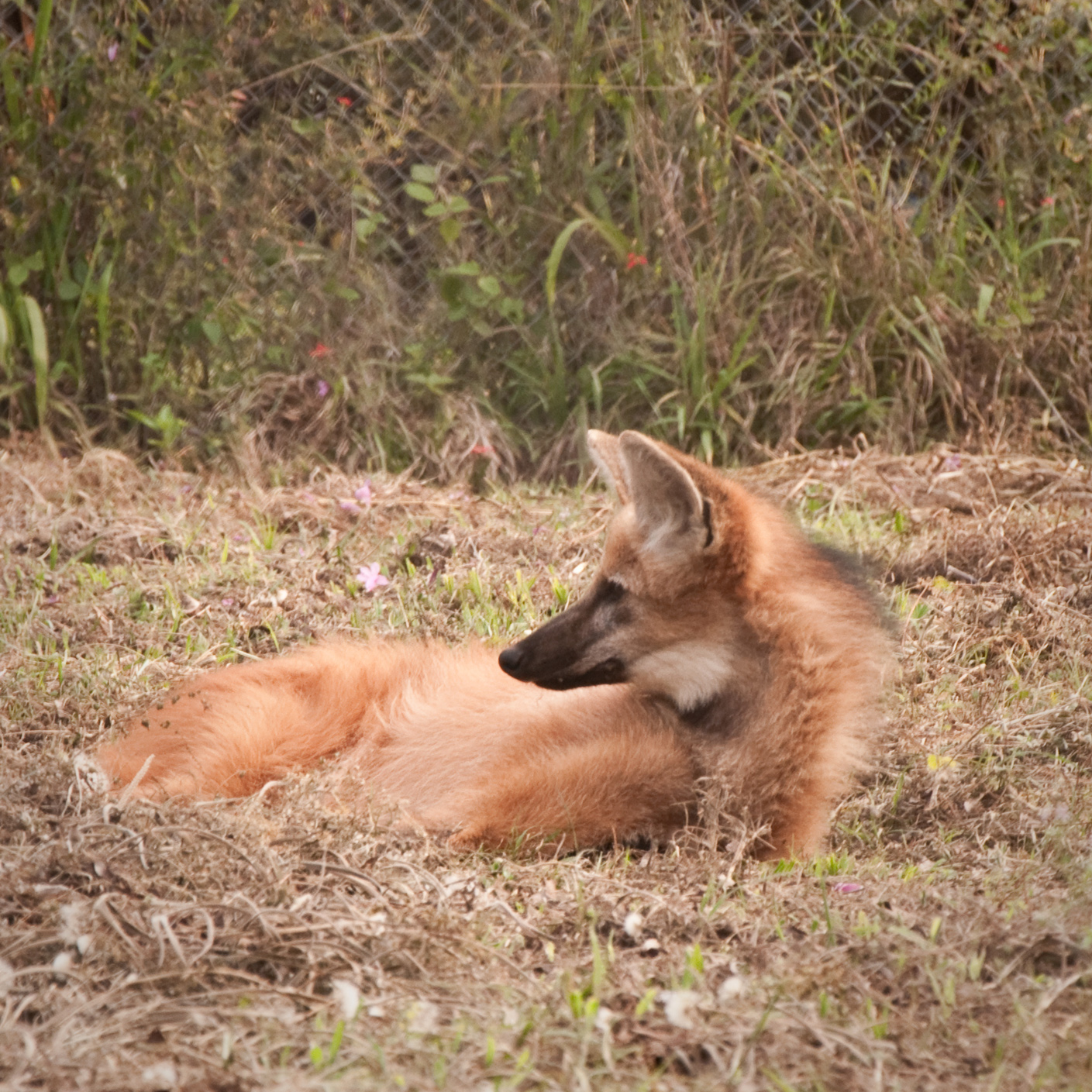 Aguará Guazú en la reserva Guaycolec, Formosa, Argentina.